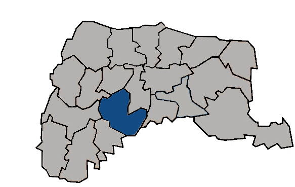 台灣省雲林縣元長鄉 KaurJmeb於2005年1月28日為編輯zh:元長鄉所繪製